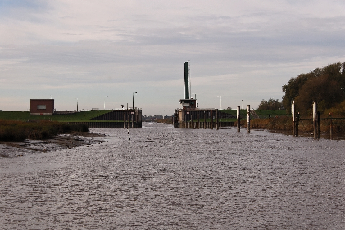 Faehranleger Wischhafen